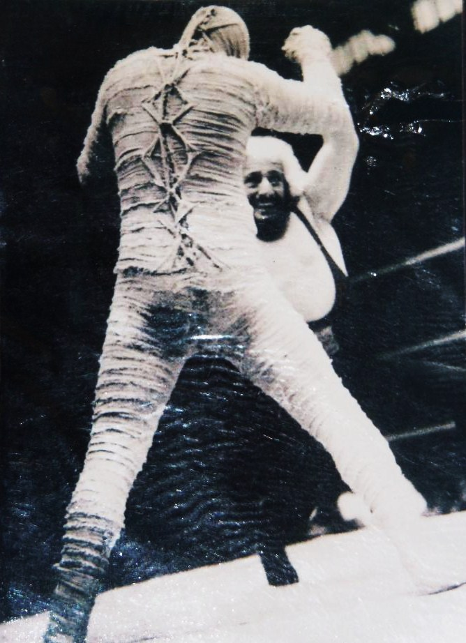 Foto de Martín Karadagián enfrentando a la Momia, (Luna Park)